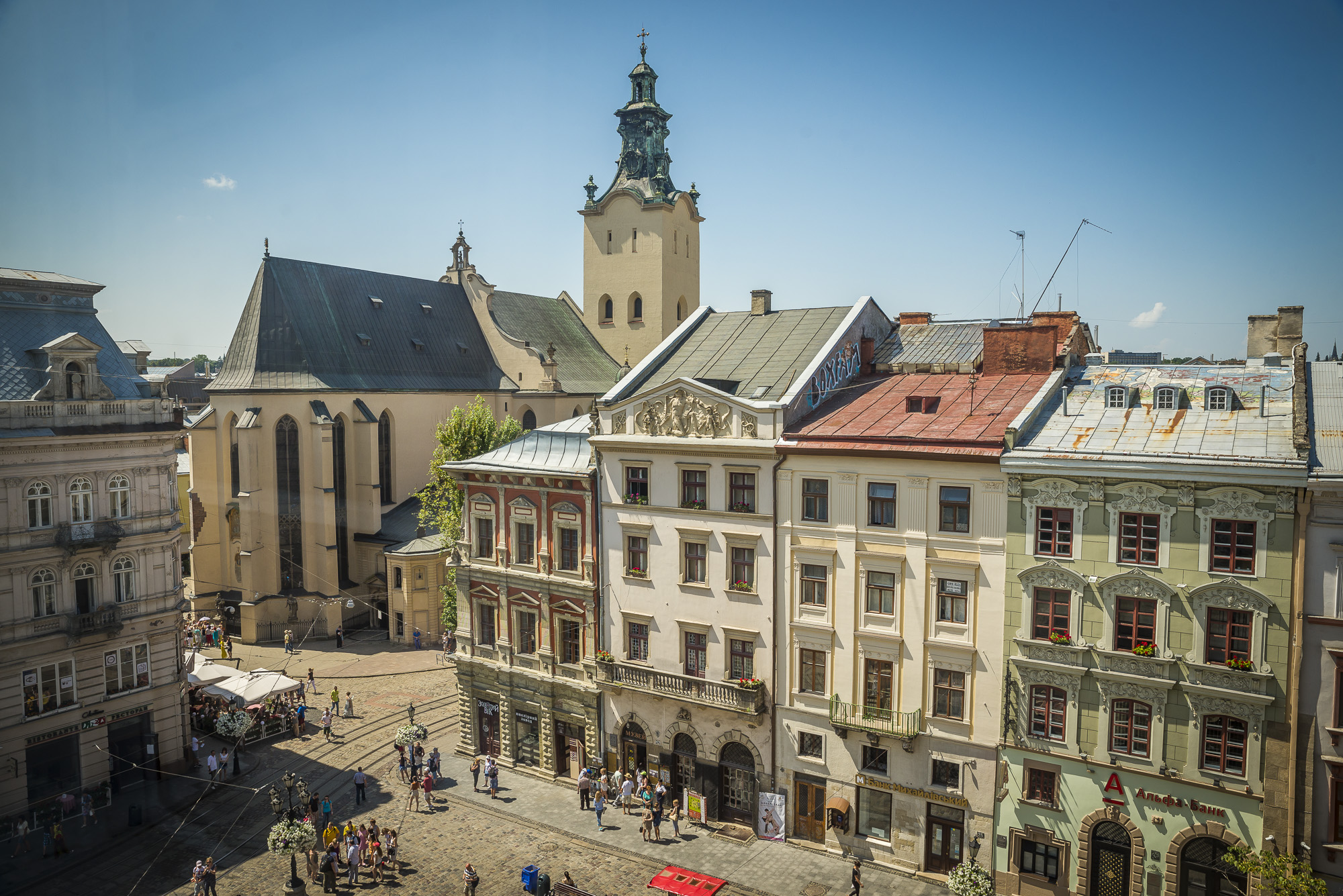 собор Кафедральний, Львів, Катедральна пл., 1